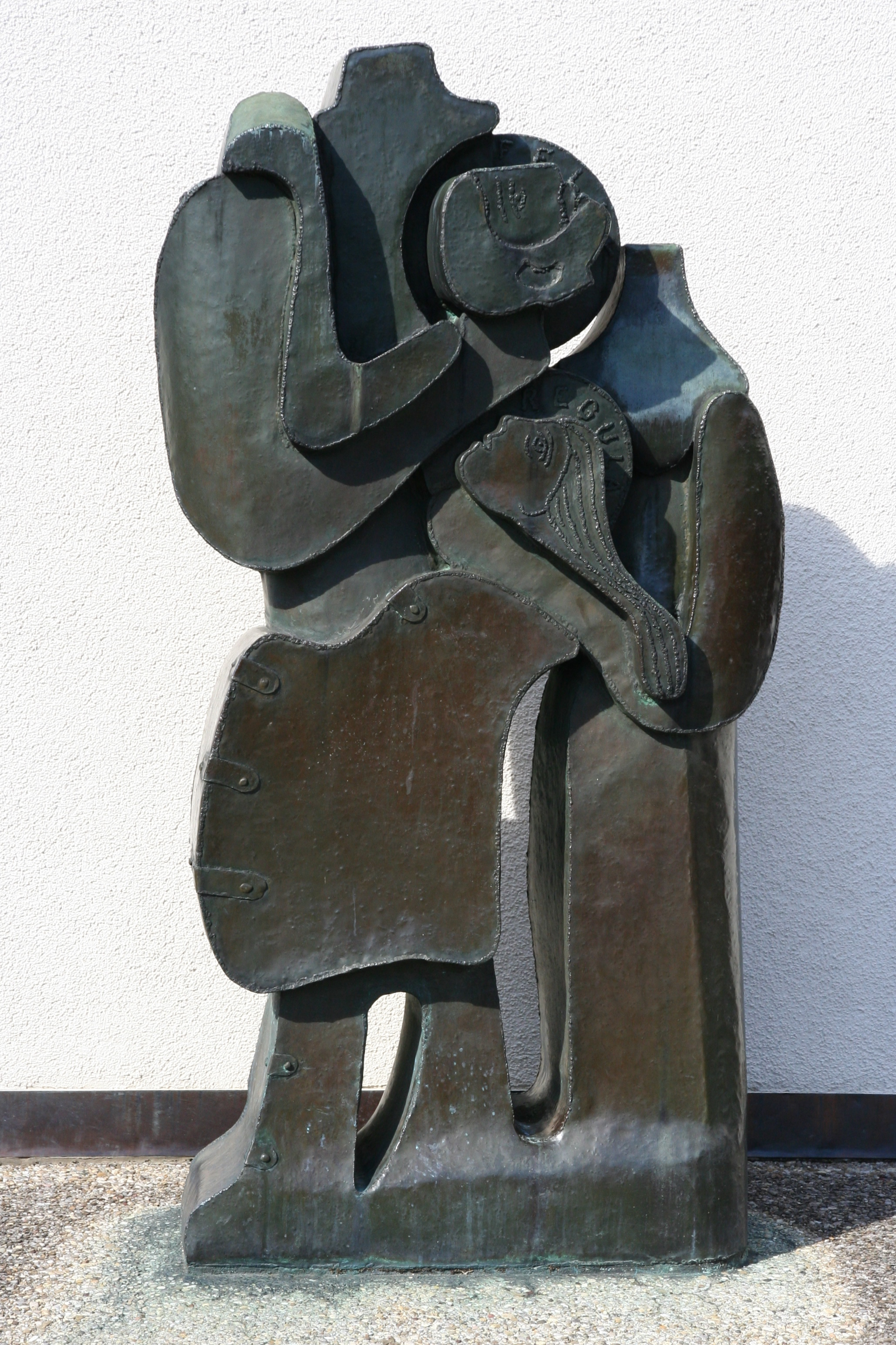 Römisch-katholische Pfarrkirche St. Felix und Regula Wattwil